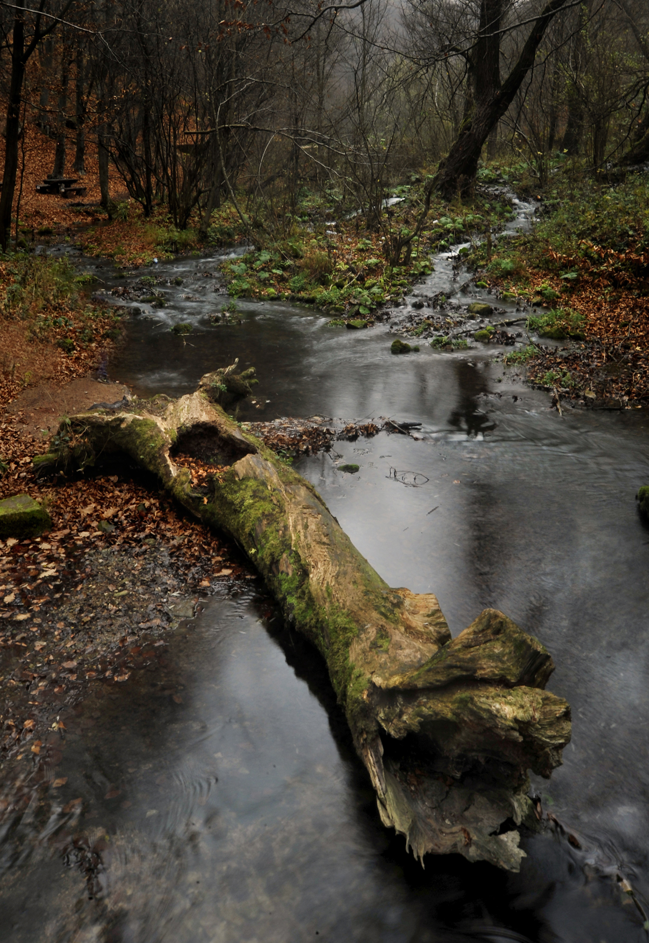 Ово је фотографија заштићеног природног добра у Србији под шифром: ПП18This is a a photo of a natural area in Serbia with ID: ПП18